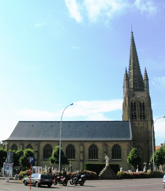 Kerk van Boezinge